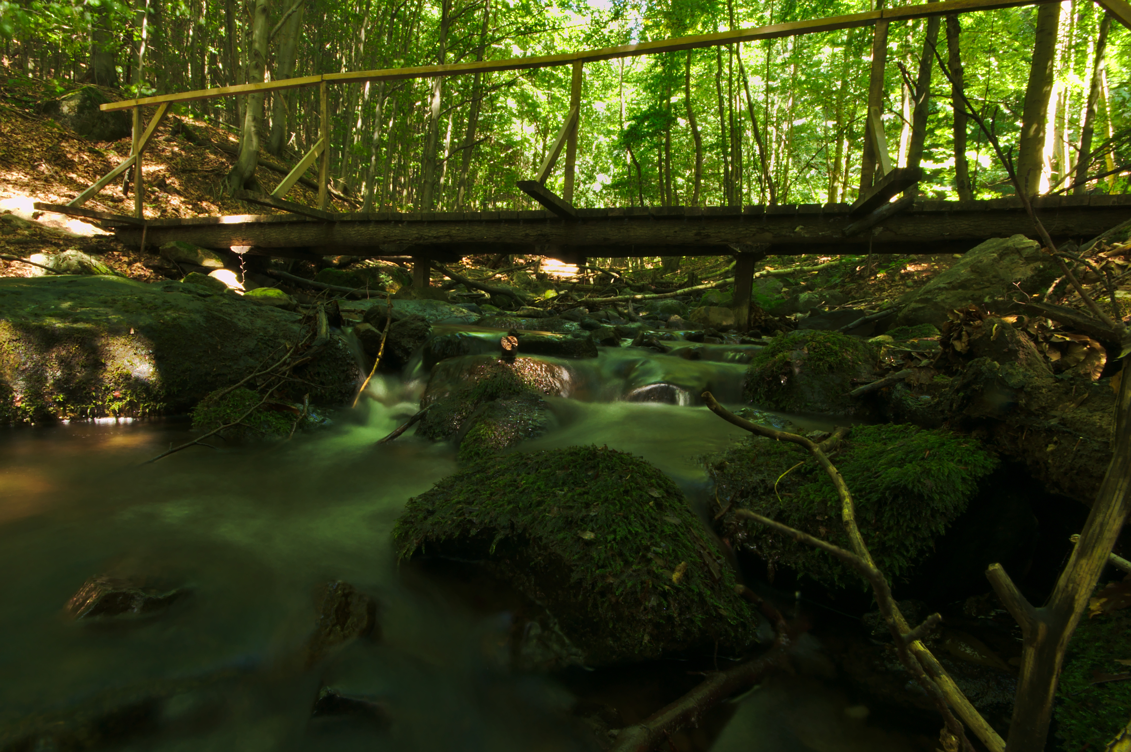 Národná prírodná rezervácia Morské oko - potok Okna, CHKO Vihorlat